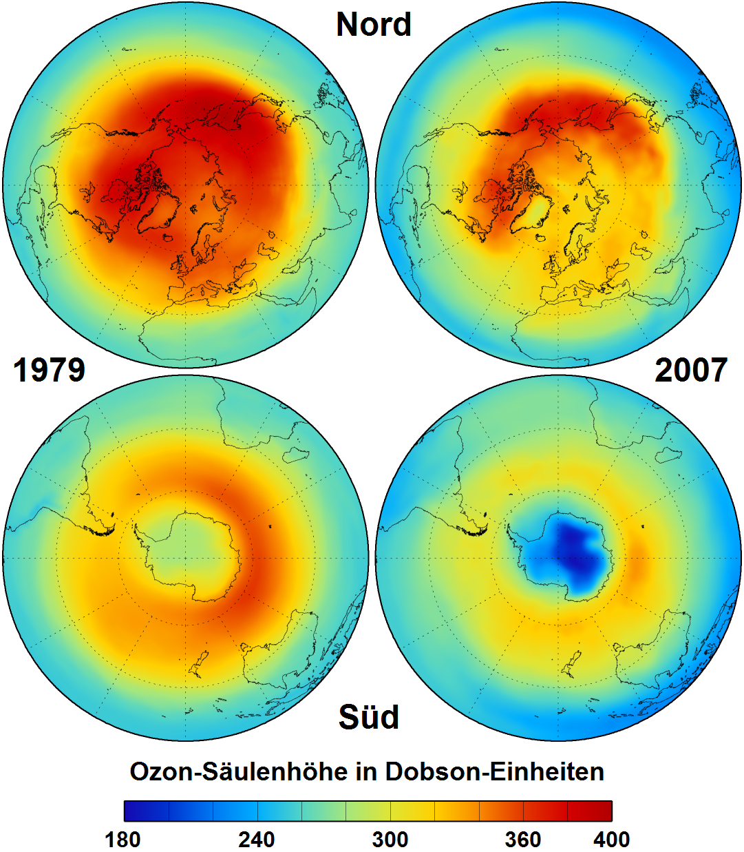 Atmosphärische Karte der Ozonschichtdicke